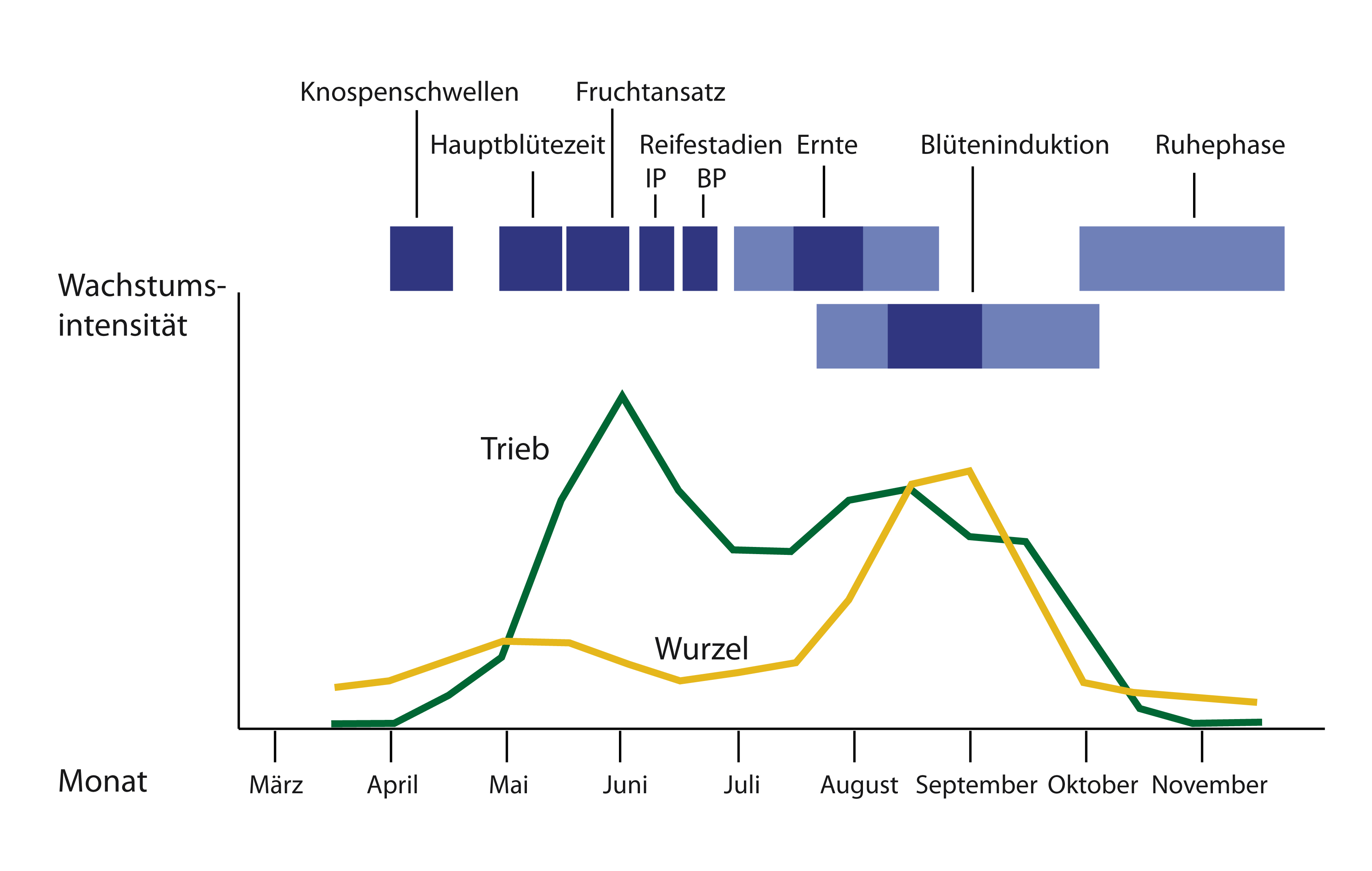 Zeitlicher Verlauf der Entwicklung von Kulturheidelbeersträuchern in Mitteleuropa; nach zwei Abb. in G. Ebert (2005): Anbau von Heidelbeeren und Cranberries, Ulmer, verändert